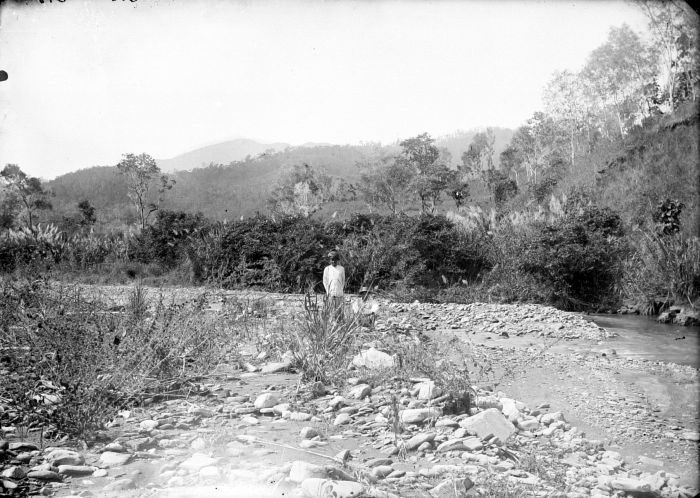 Negatief. De bedding van de rivier Loemaiti op Boeroe